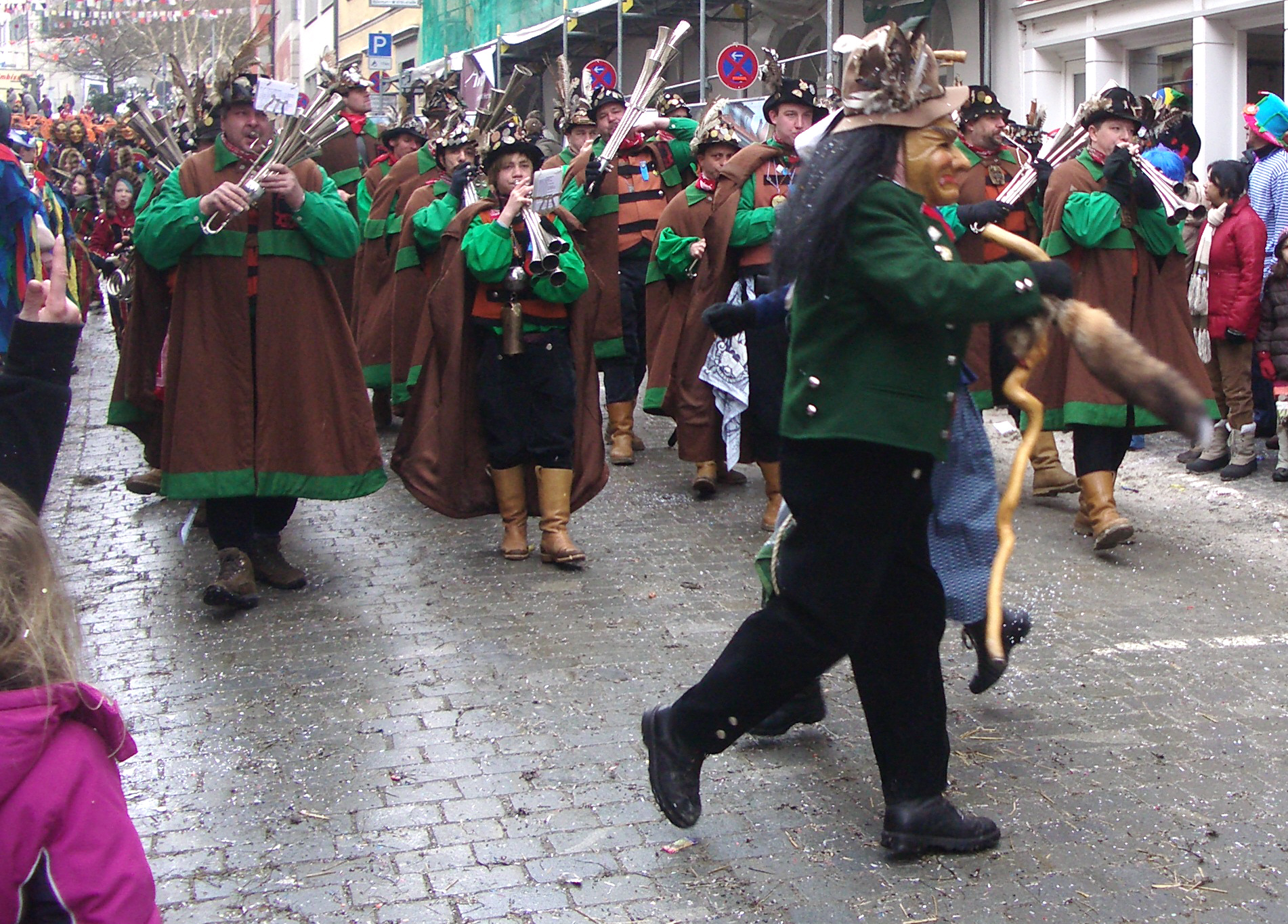 Narrensprung in Ravensburg am Fasnetsmontag 2010 Schwarze Veri Zunft Ravensburg, Schwarze-Veri-Schalmeien